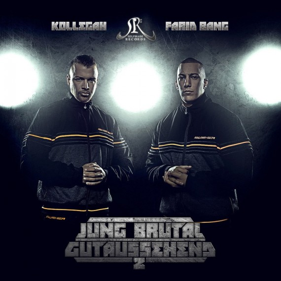 Cover des Albums „Jung, brutal, gutaussehend 2“